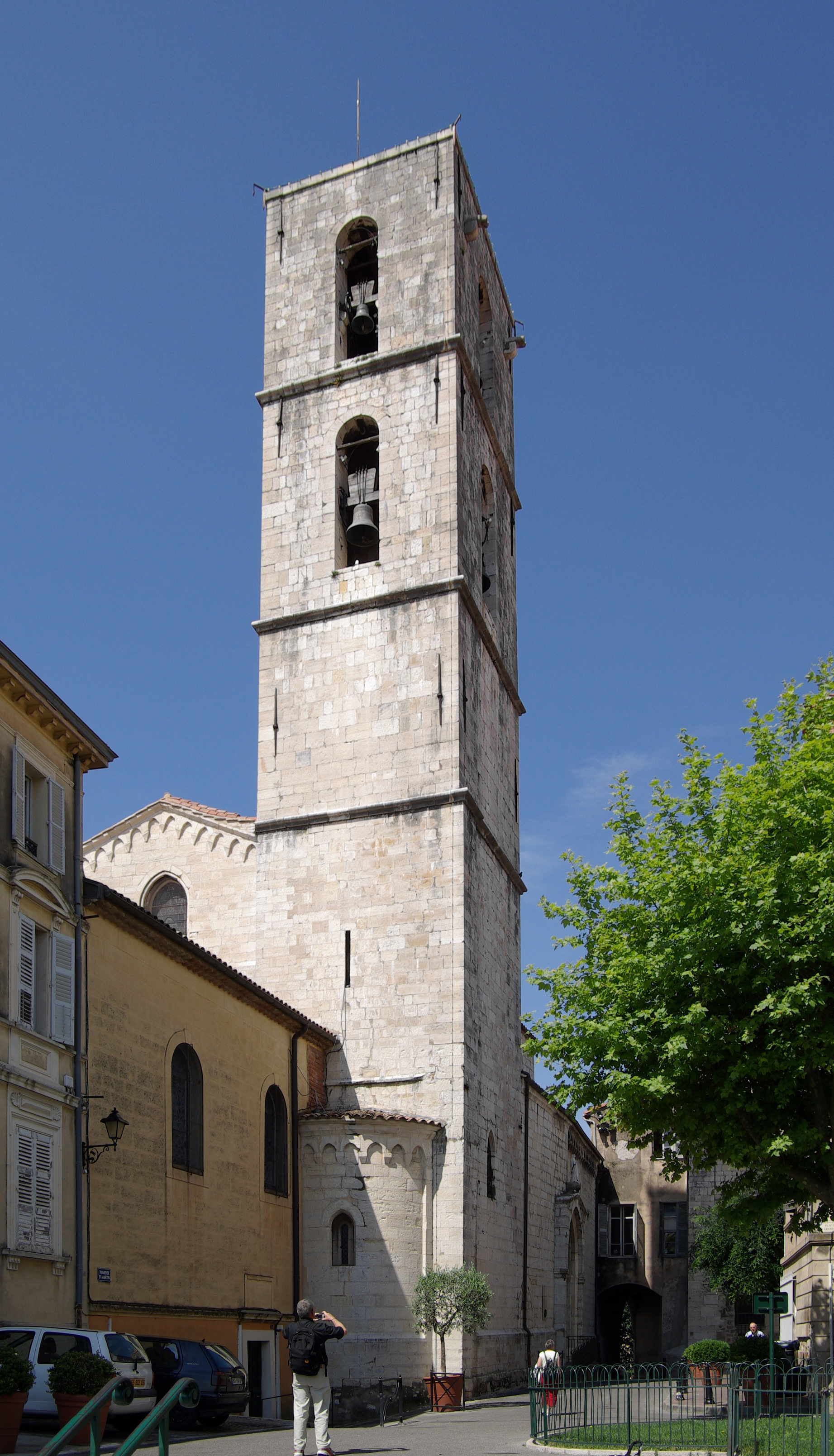 Cathédrale Notre-Dame-du-Puy de Grasse